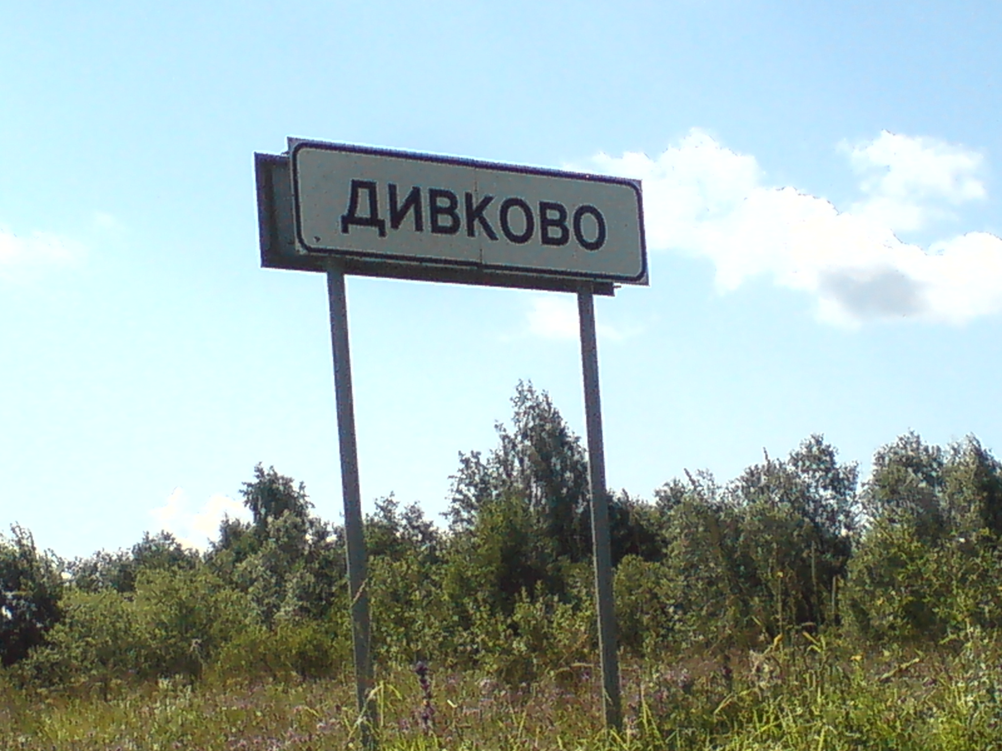 Дорожный указатель деревни Дивково на дороге Кириллов-Белозерск